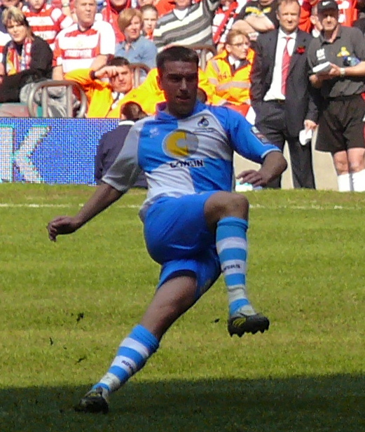 Bristol Rovers vs Doncaster Rovers - Lambert strikes